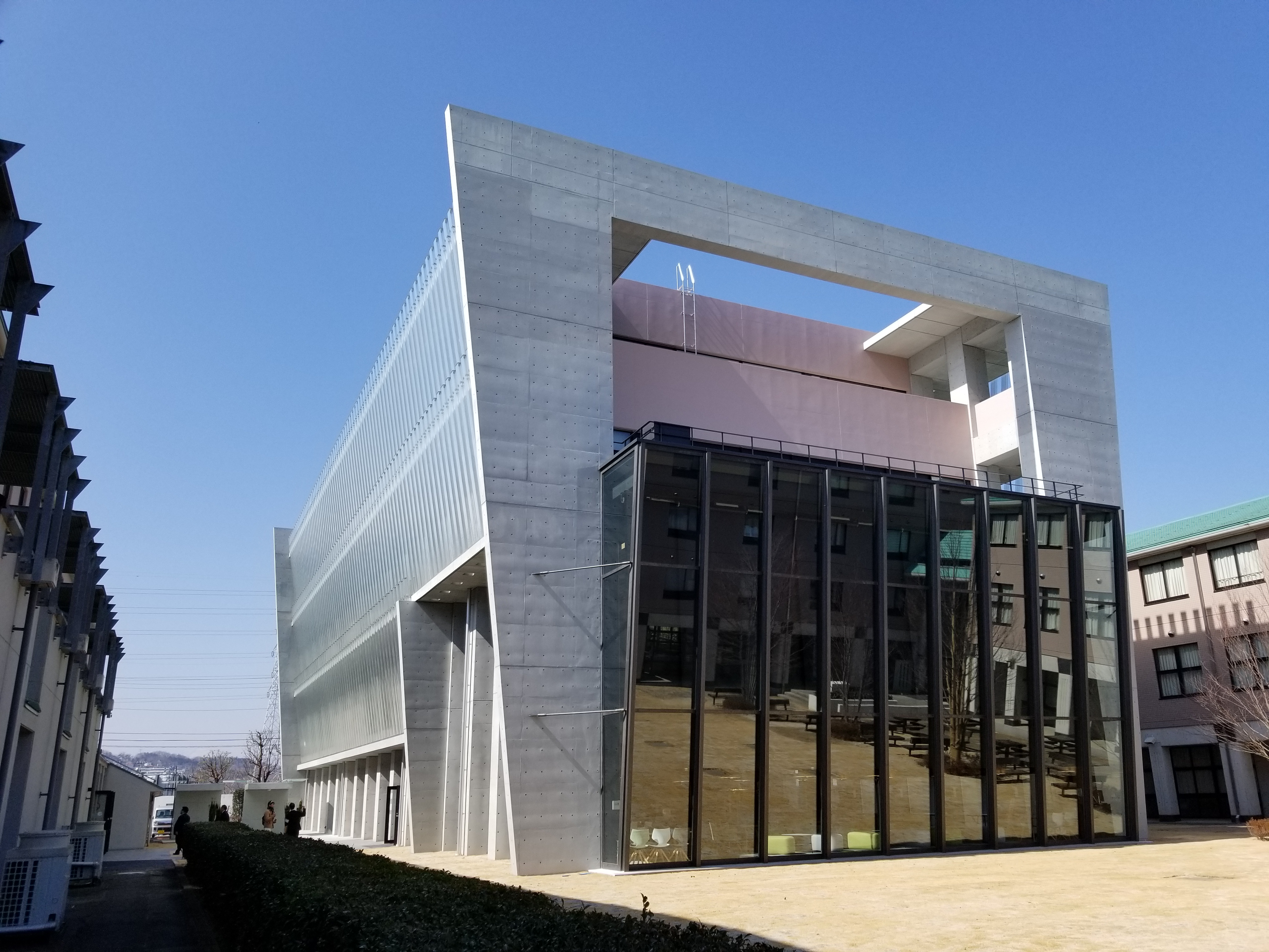 新校舎SKY